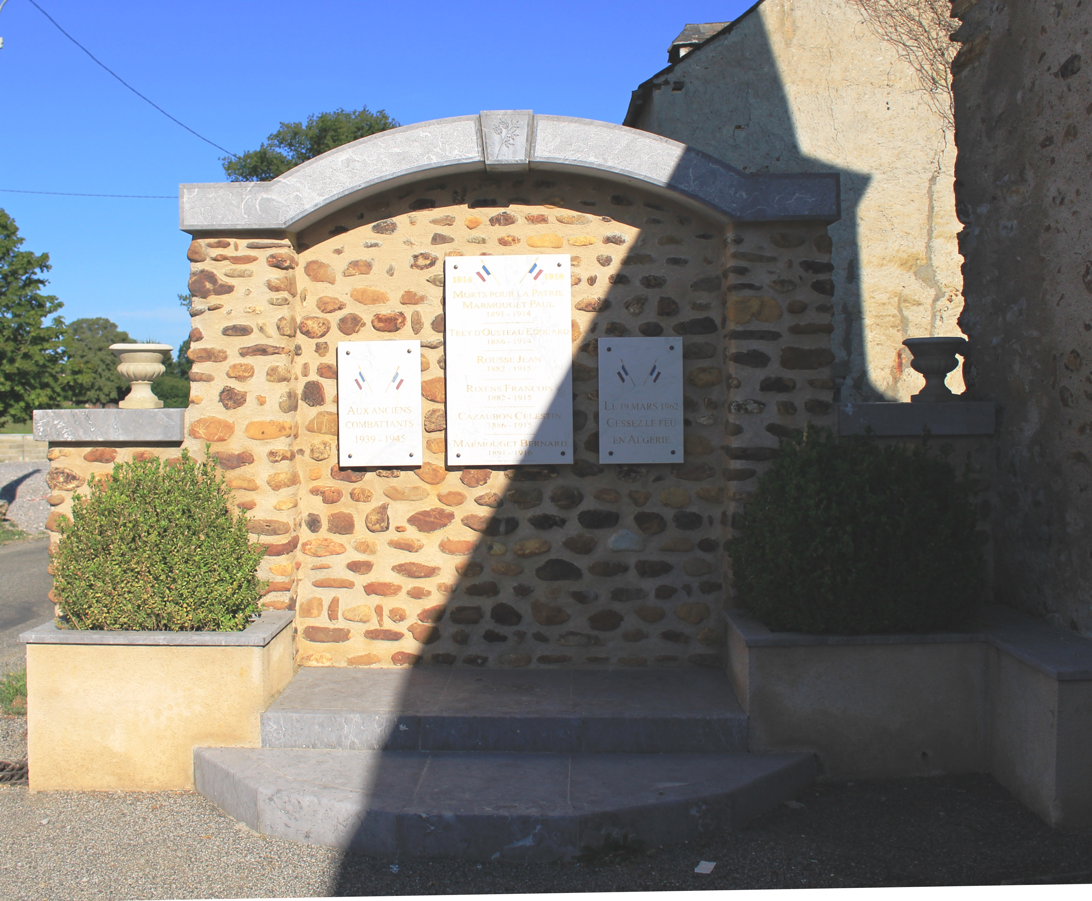 Monument aux morts de Lagrange (Hautes-Pyrénées)